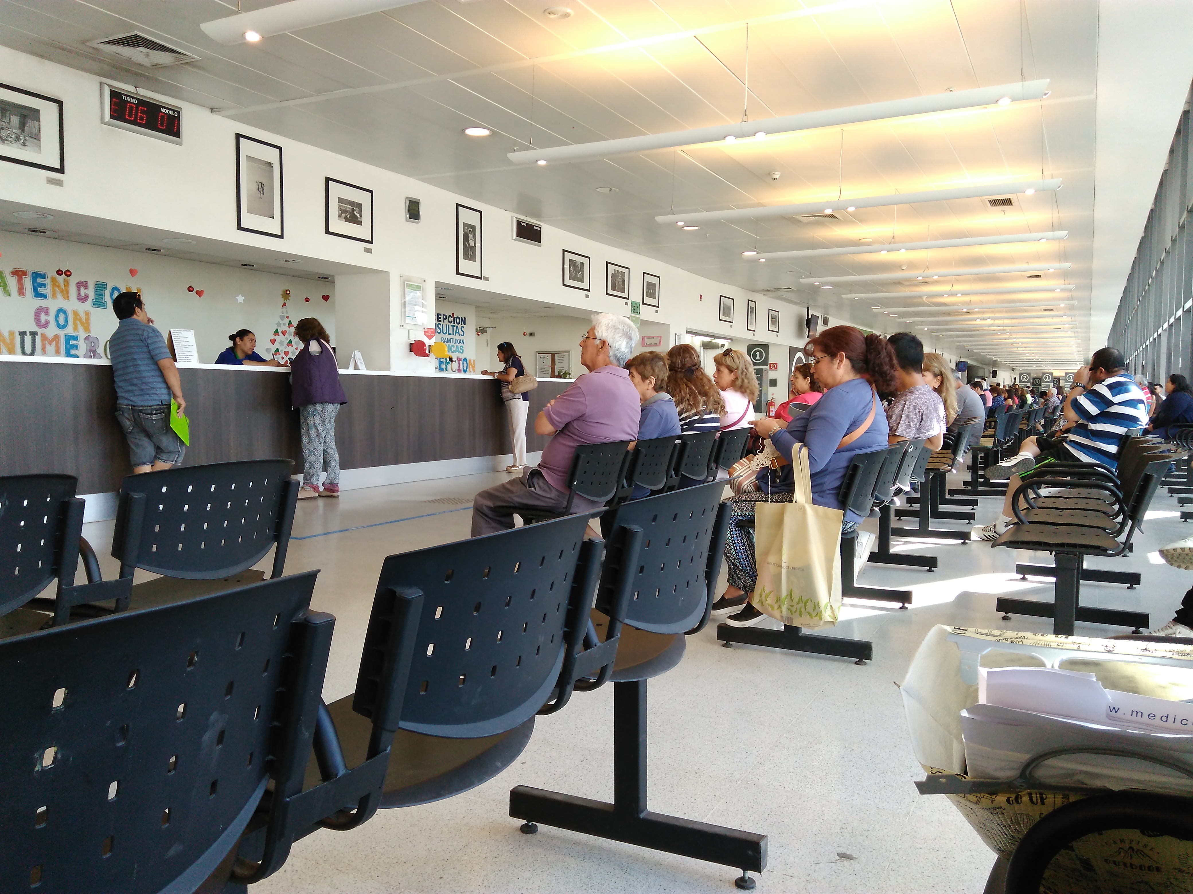 Panorámica del interior del Hospital El Carmen en la comuna de Maipú. Santiago de Chile.